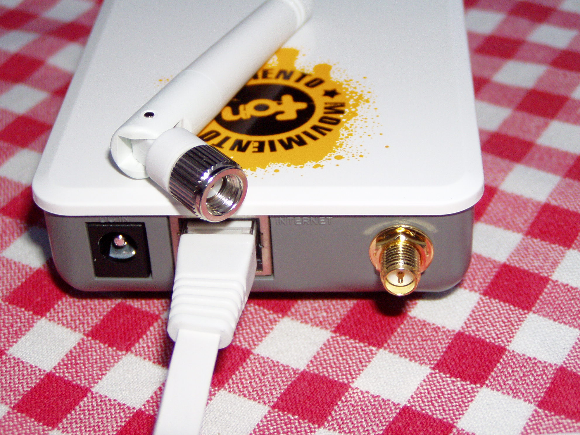 La Fonera (FON WiFi router) : antenna connector